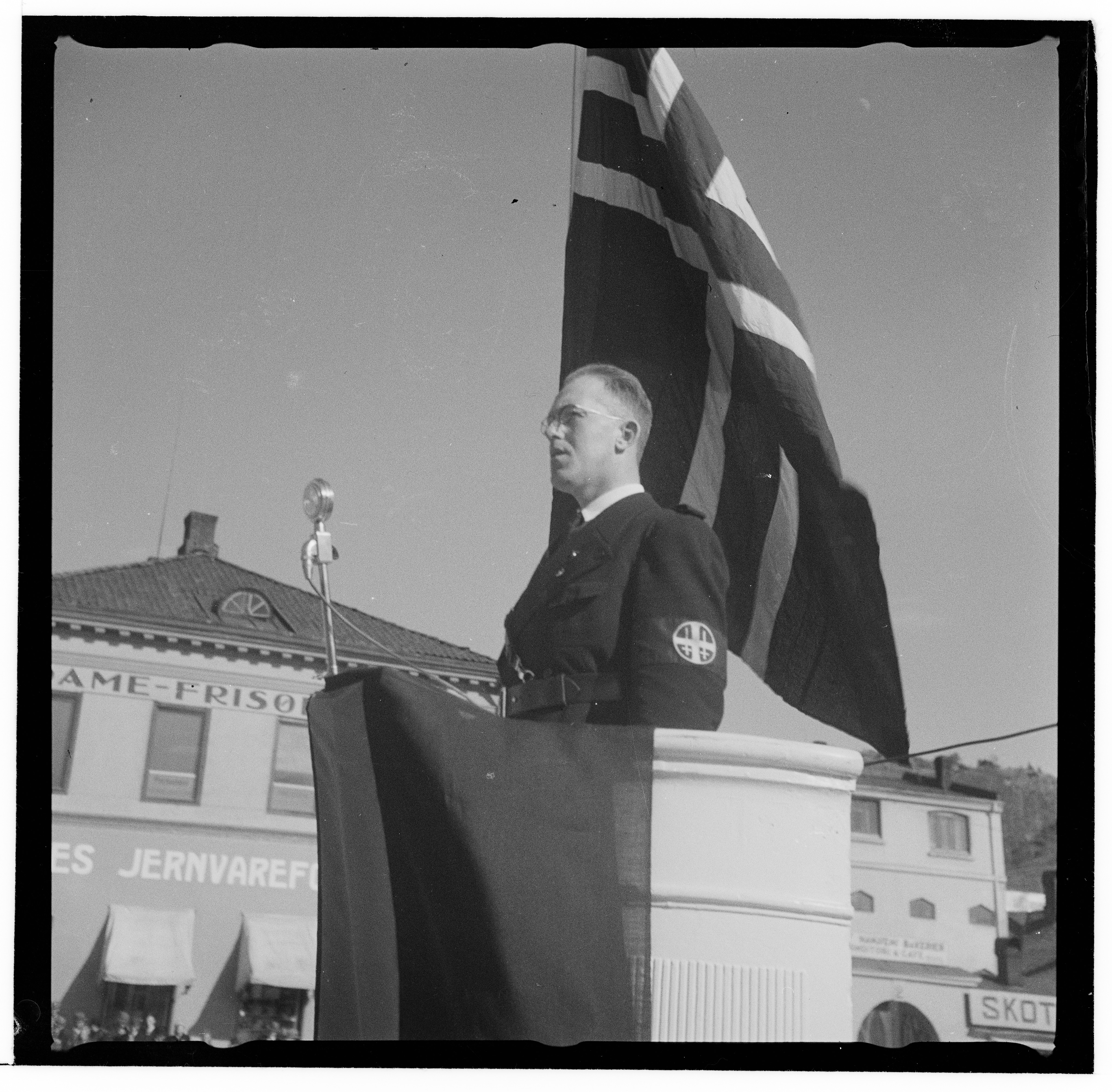 Hirdmønstring i Halden 4. mai 1941. Fylkesfører i Østfold, Hoff, taler.